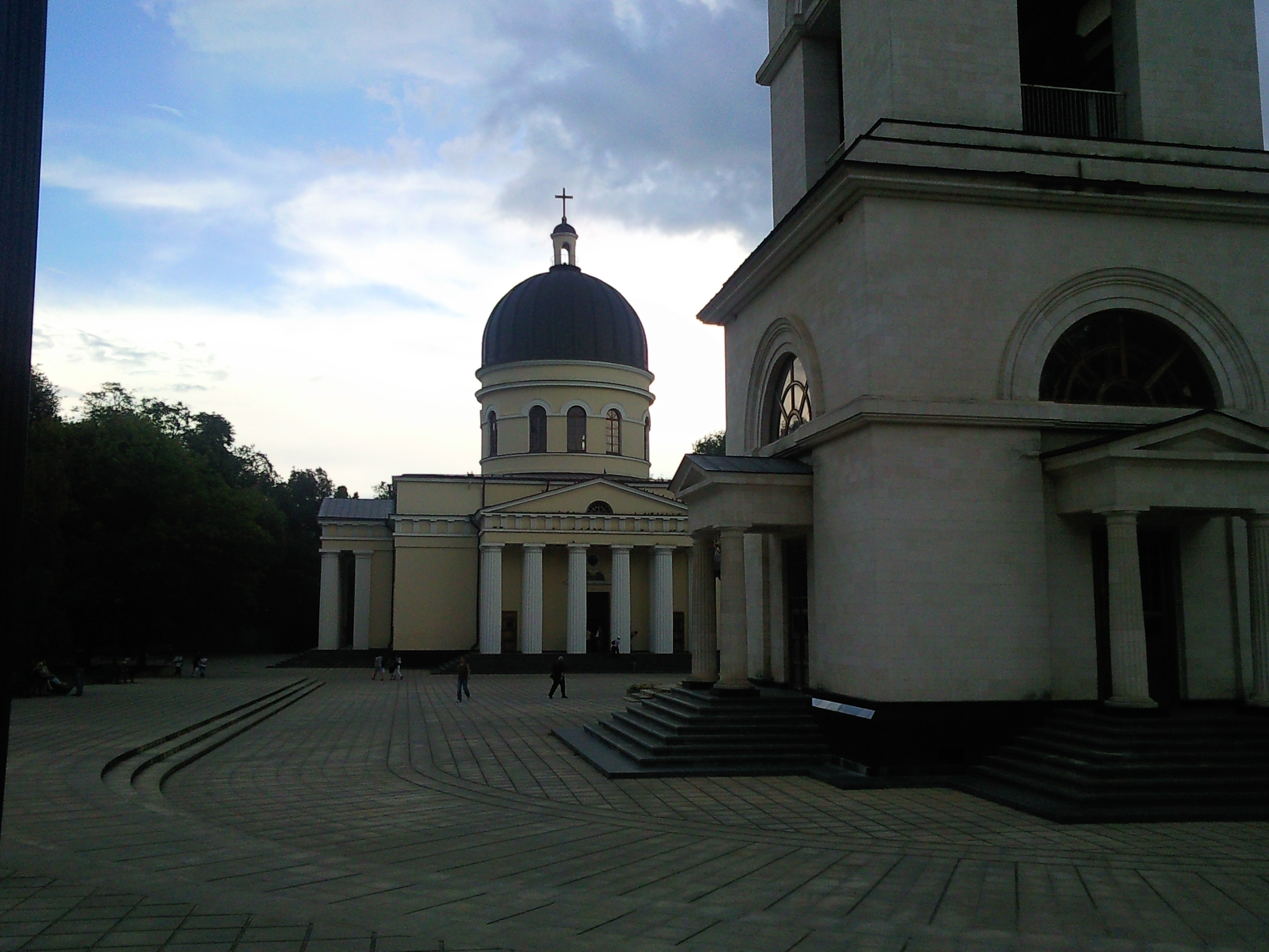 Кафедральный собор Кишинева